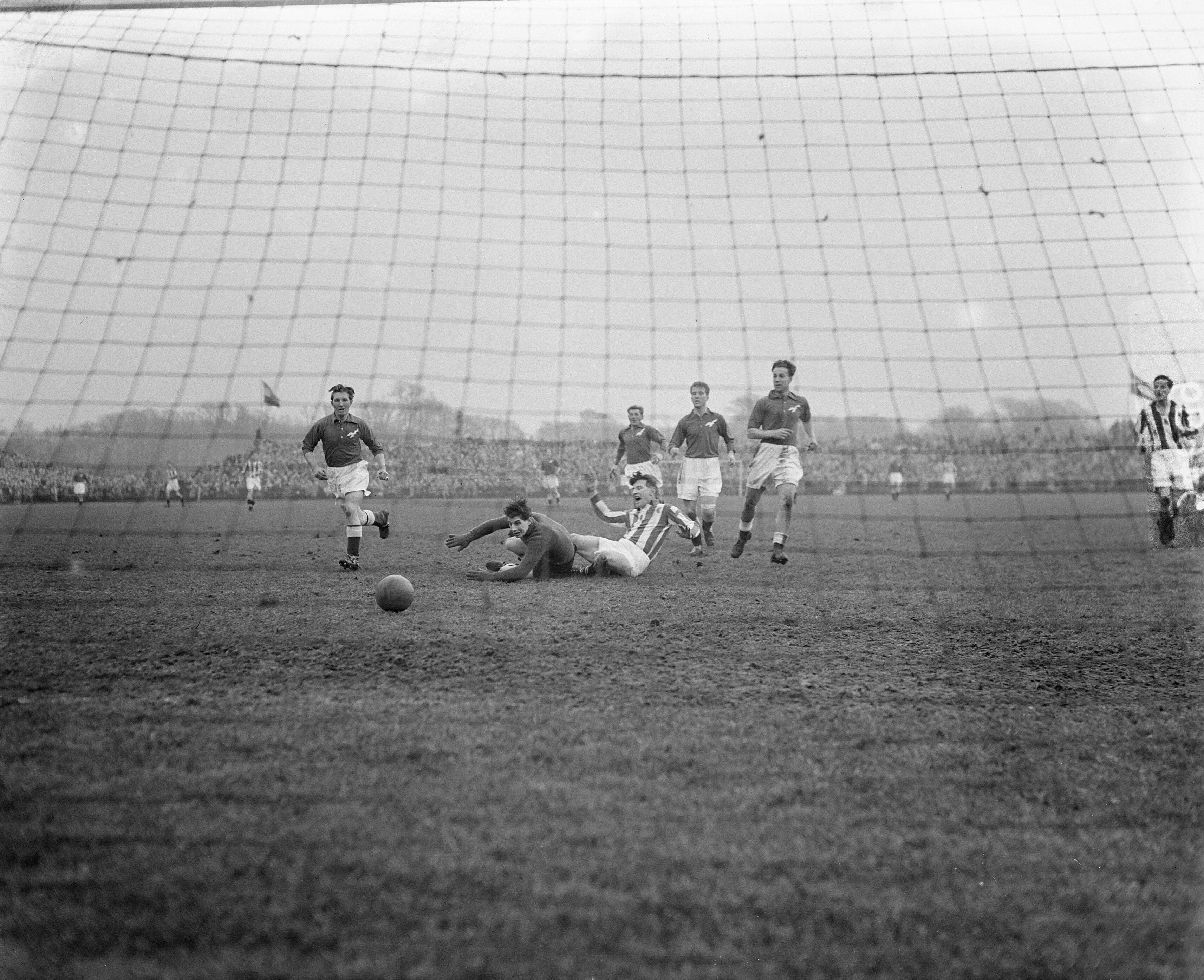 Collectie / Archief : Fotocollectie Anefo Reportage / Serie : [ onbekend ] Beschrijving : Voetbal Stormvogels tegen Heerenveen. Spelmoment Annotatie : Abe Lenstra maakt de 0-1 voor Heerenveen. Keeper (invaller) Joop Venus van Stormvogels is gepasseerd Datum : 28 december 1952 Locatie : IJmuiden Trefwoorden : sport, sport, voetbal, voetbal Instellingsnaam : Stormvogels Fotograaf : Pot, Harry / Anefo Auteursrechthebbende : Nationaal Archief Materiaalsoort : Glasnegatief Nummer archiefinventaris : bekijk toegang 2.24.01.09 Bestanddeelnummer : 905-4689